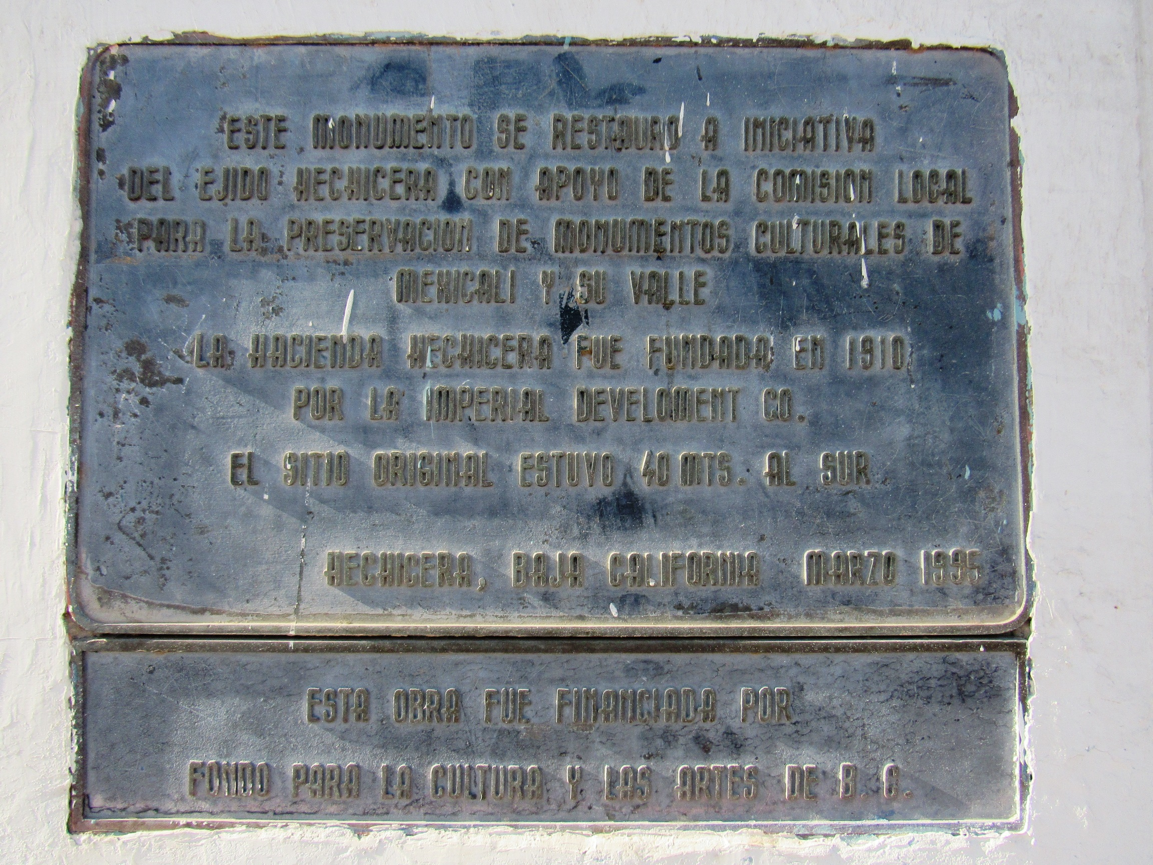 Placa en uno de los cimientos del arco del poblado Hechicera visto de frente, se encuentra del lado derecho.